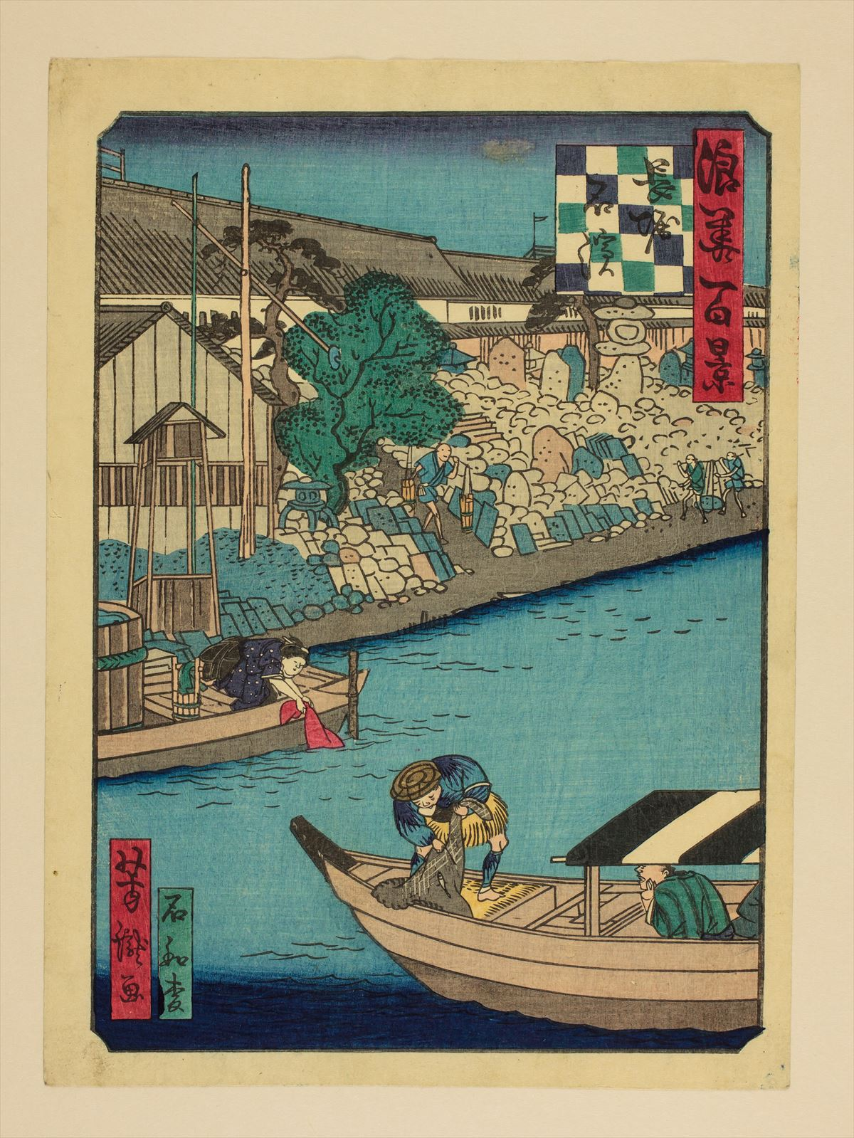 1800年代。里の家芳瀧/画。浪花百景 102枚のうちの1枚。大阪市立中央図書館蔵。